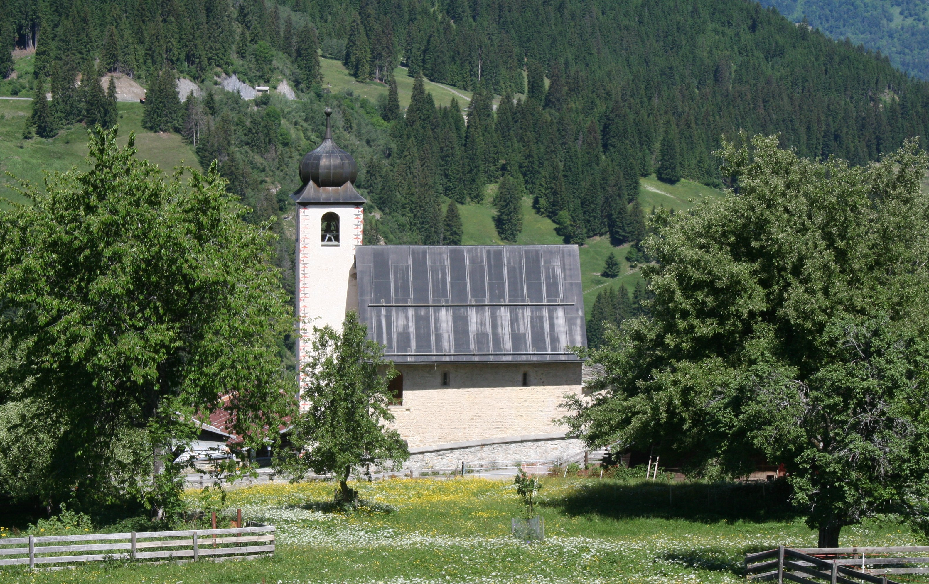 Ansicht von Süden